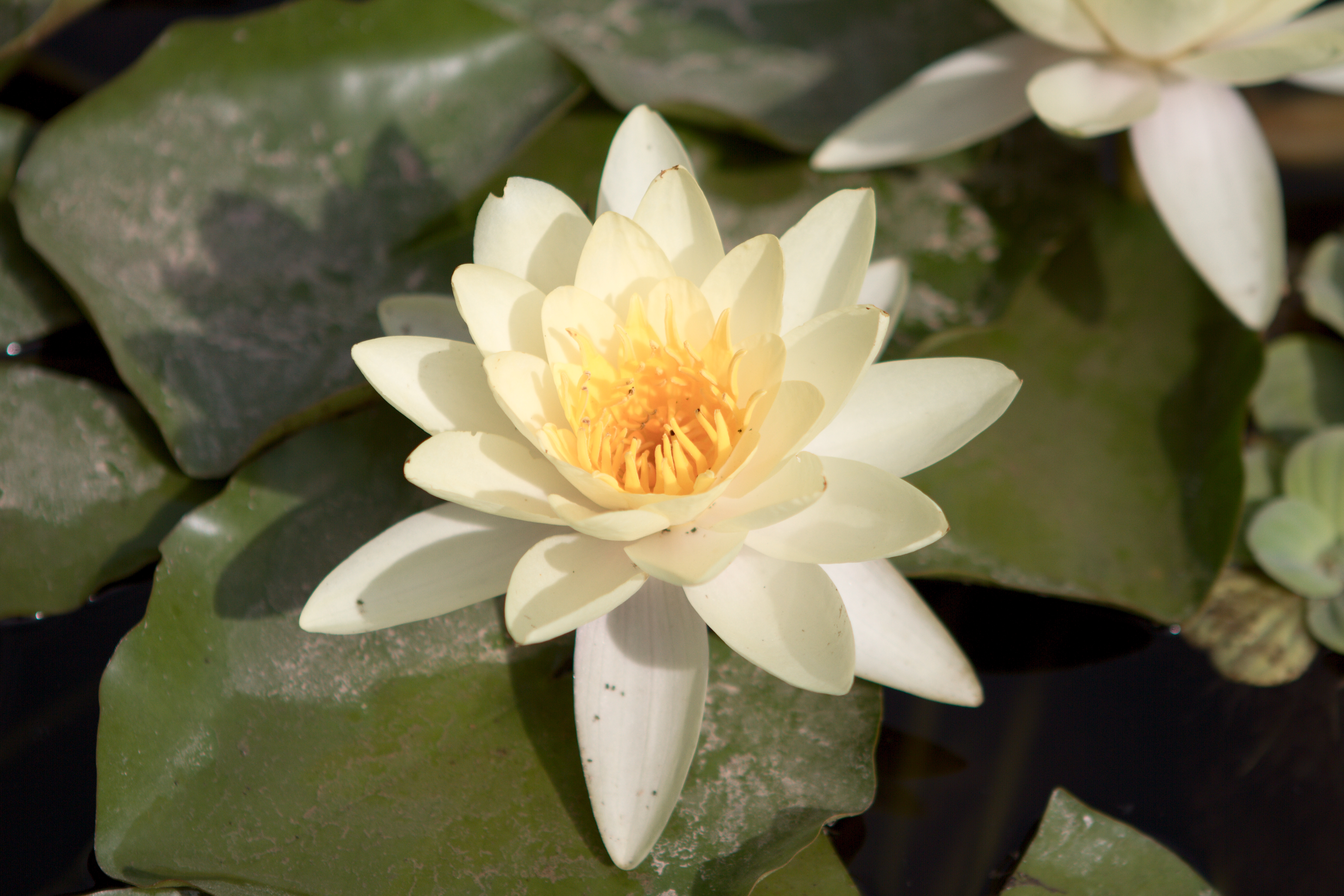 Nénuphar blanc (Nymphaea alba) à la bambouseraie de Prafrance (Gard, France).